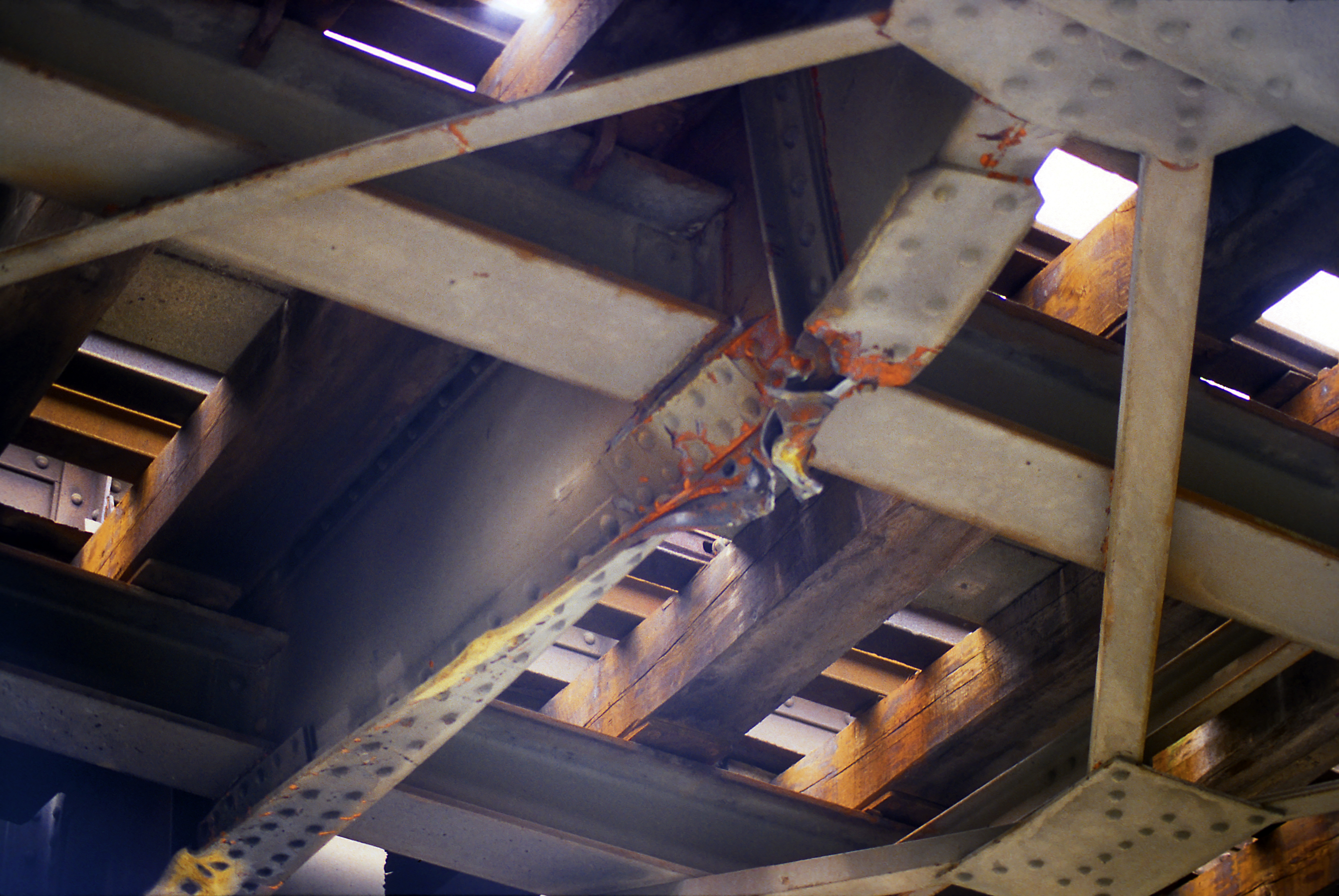 Die Stelle, wo der Ausleger des Baggers den Querträger getroffen hat, ist gut zu erkennen.